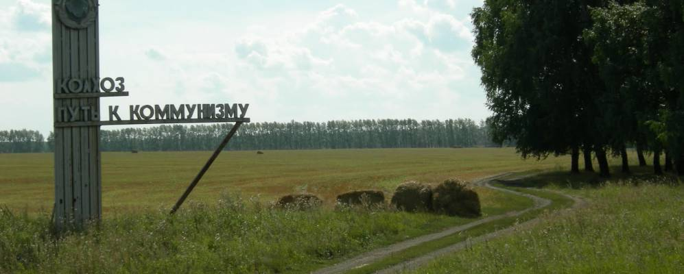 Въезд в колхоз «Путь к коммунизму», в селе Сиалеевская Пятина